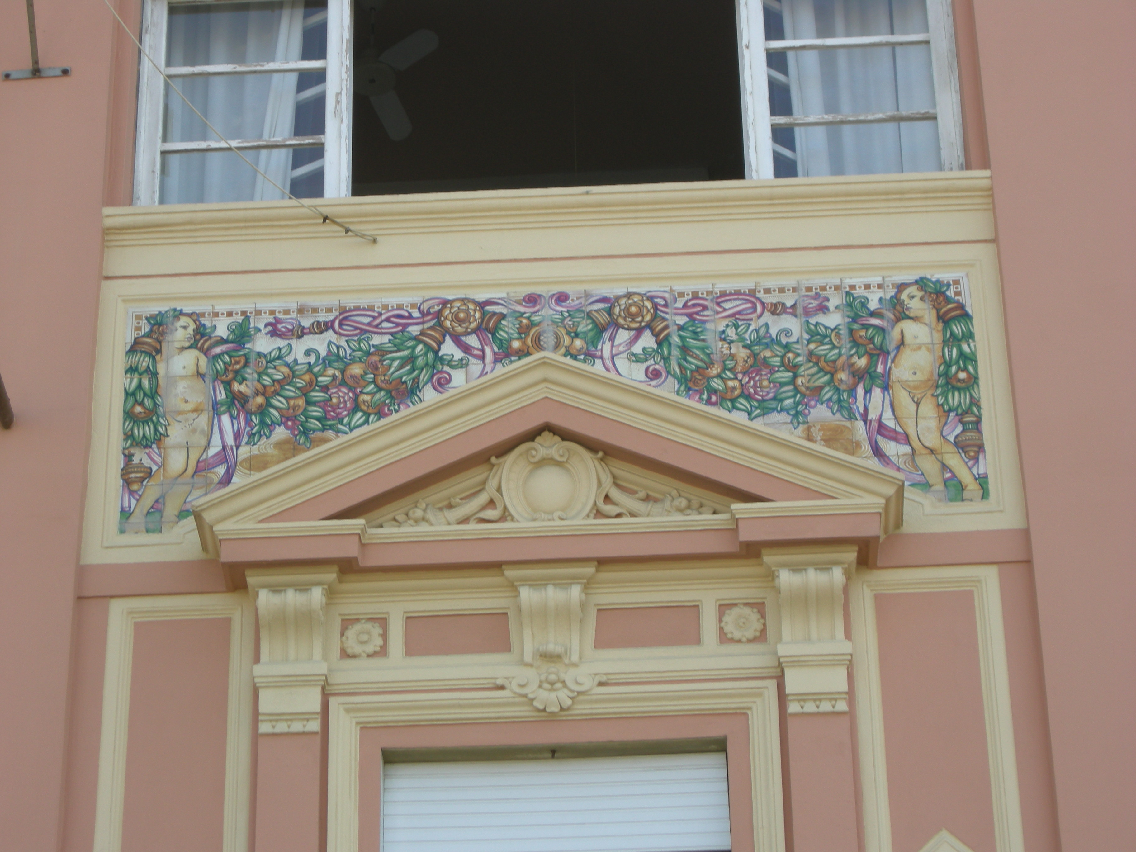 Hotel liberty, viareggio, ceramiche